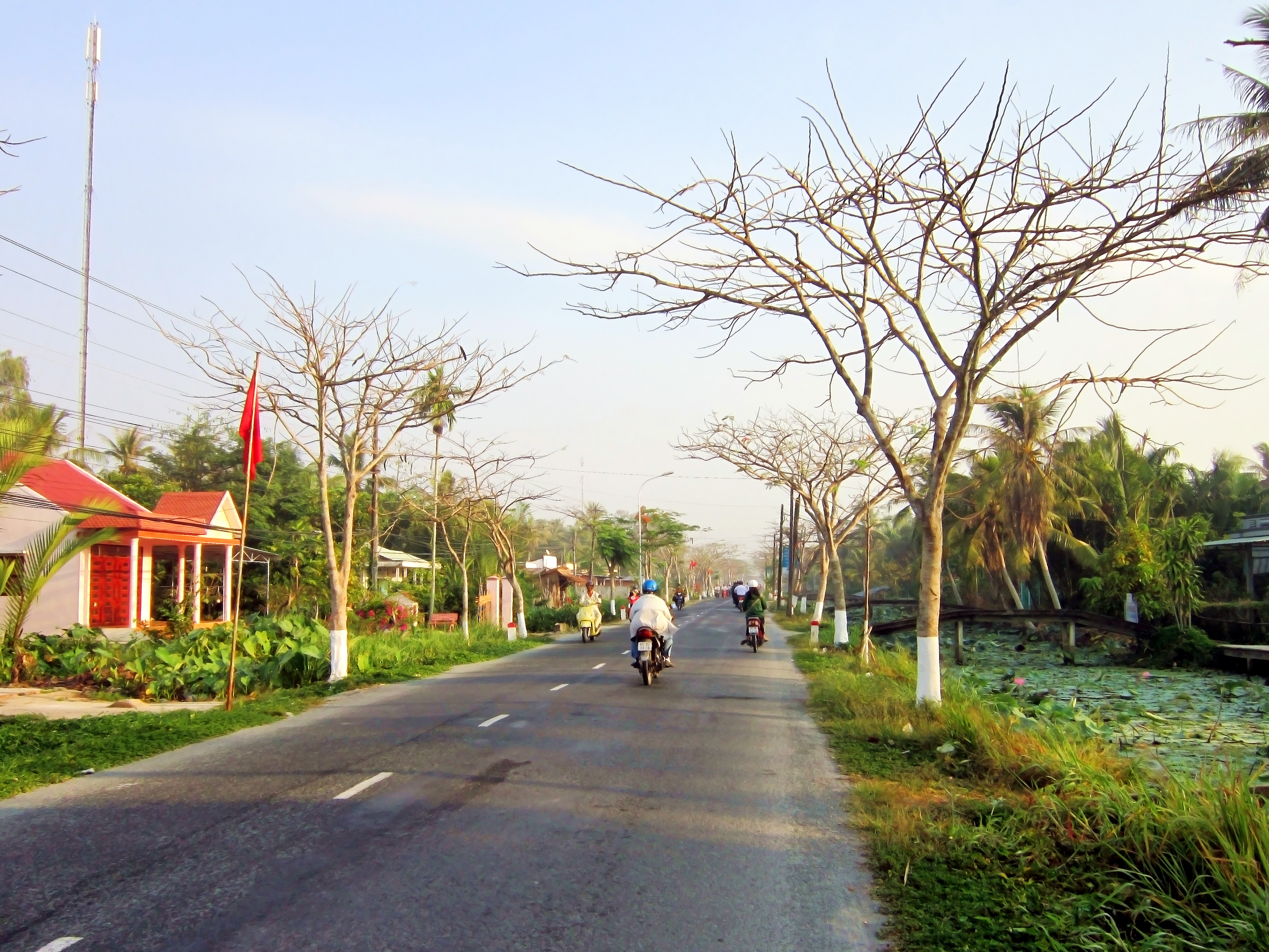 Trên Quốc lộ 61B, dẫn vào thị trấn Long Mỹ, thuộc huyện Long Mỹ, tỉnh Hậu Giang, Việt Nam.